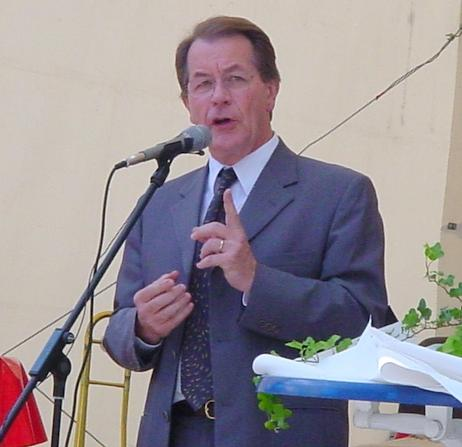 Franz Müntefering